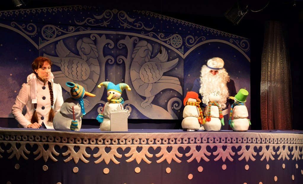 Сцена из спектакля "Чудеса в Дедморозовке"